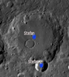 Cráter lunar Stefan. Cráteres satélite. (Imagen LRO)